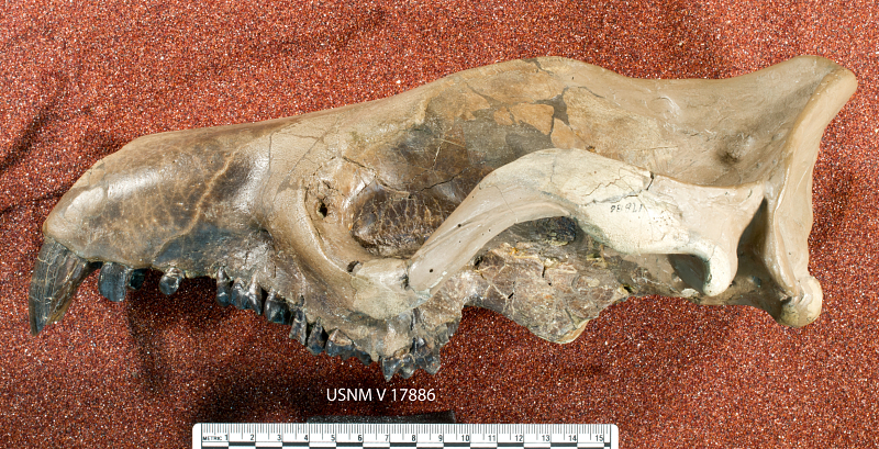 Trogosus hyracoides (Marsh)